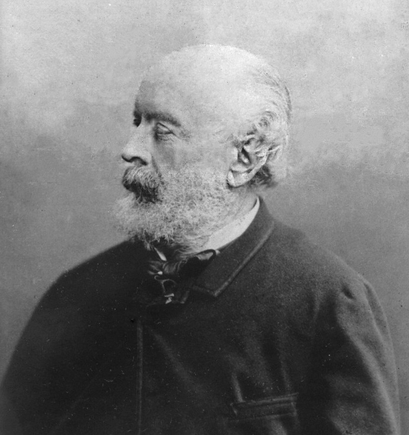 Charles-Evariste-Vital Luminais (1821-1890) photographié en 1870.